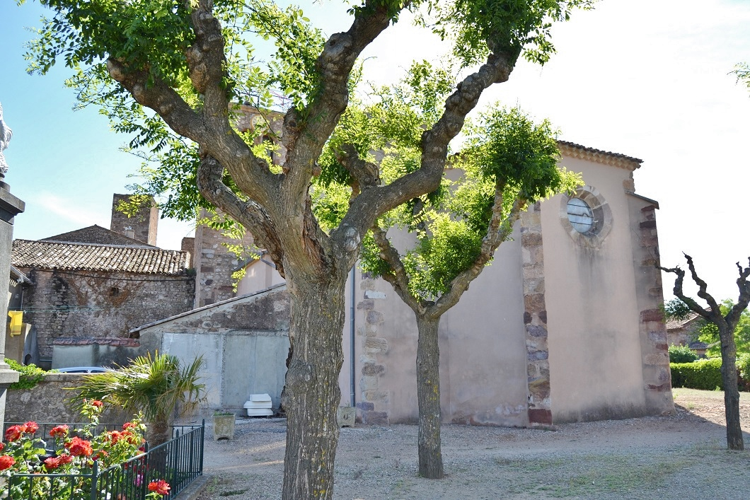 Chevet de l'église Notre-Dame-de-l'Assomption de Villes passans (34).